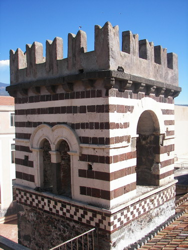 Ordine superiore della torre Campanaria di Santa Maria di Licodia opera del 1143. La loggia superiore caratterizzata dalla decorazione a fascie alternate.